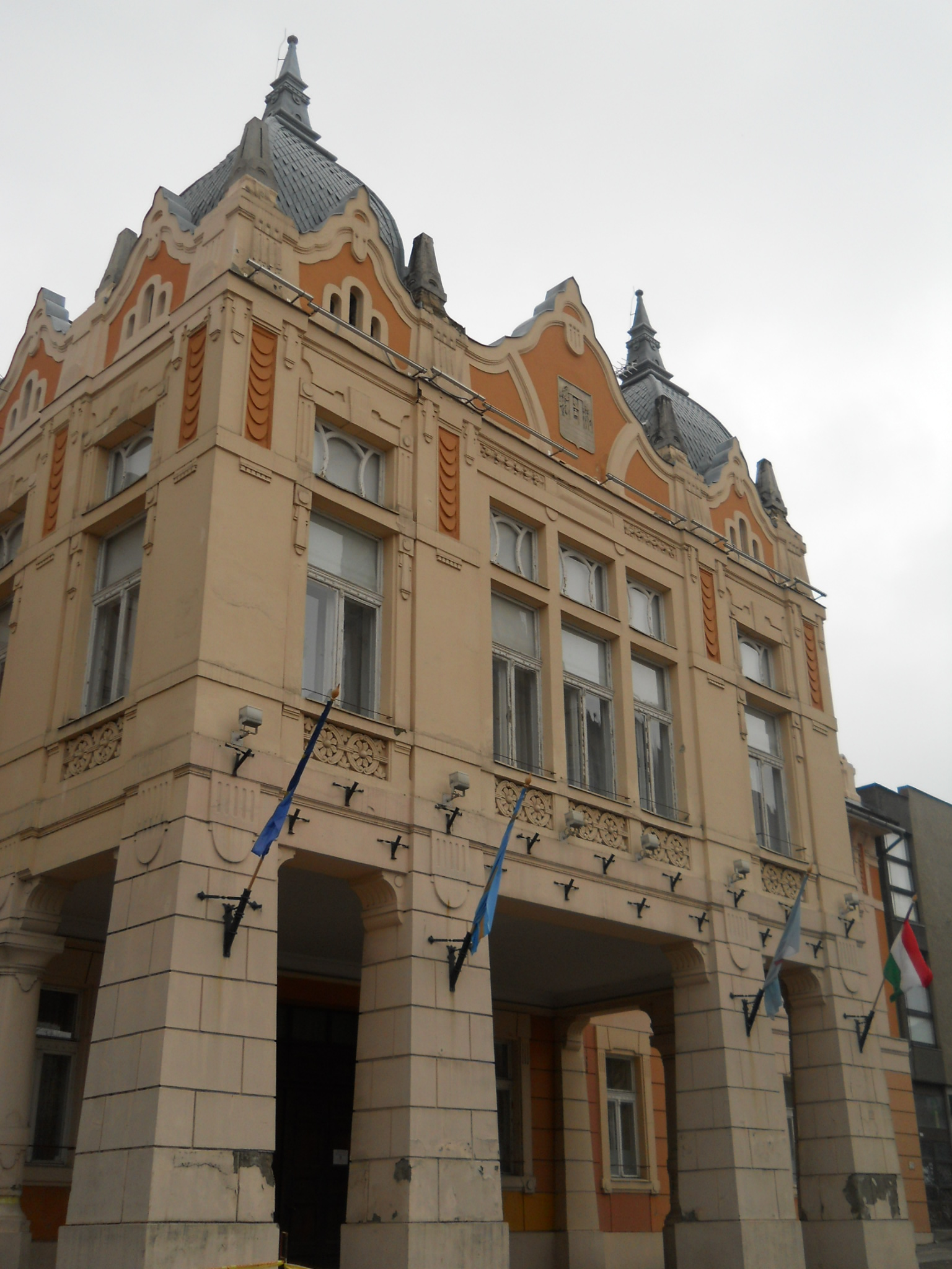 Szekszárd - városháza